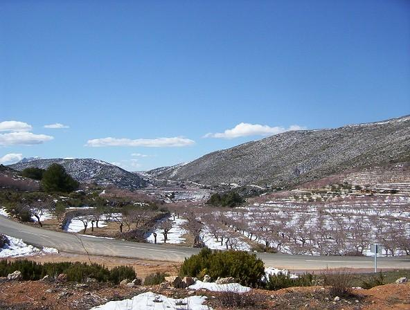 Vall de Bijauca nevada, Tàrbena (Marina Baixa).